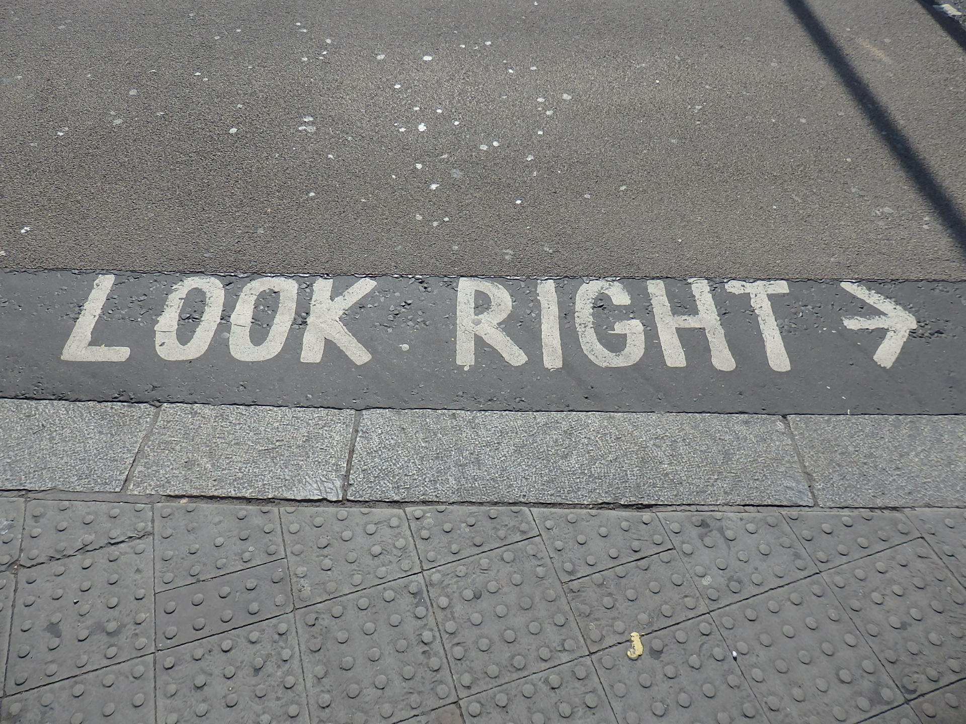 Fußgängerhinweis auf Linksverkehr, London